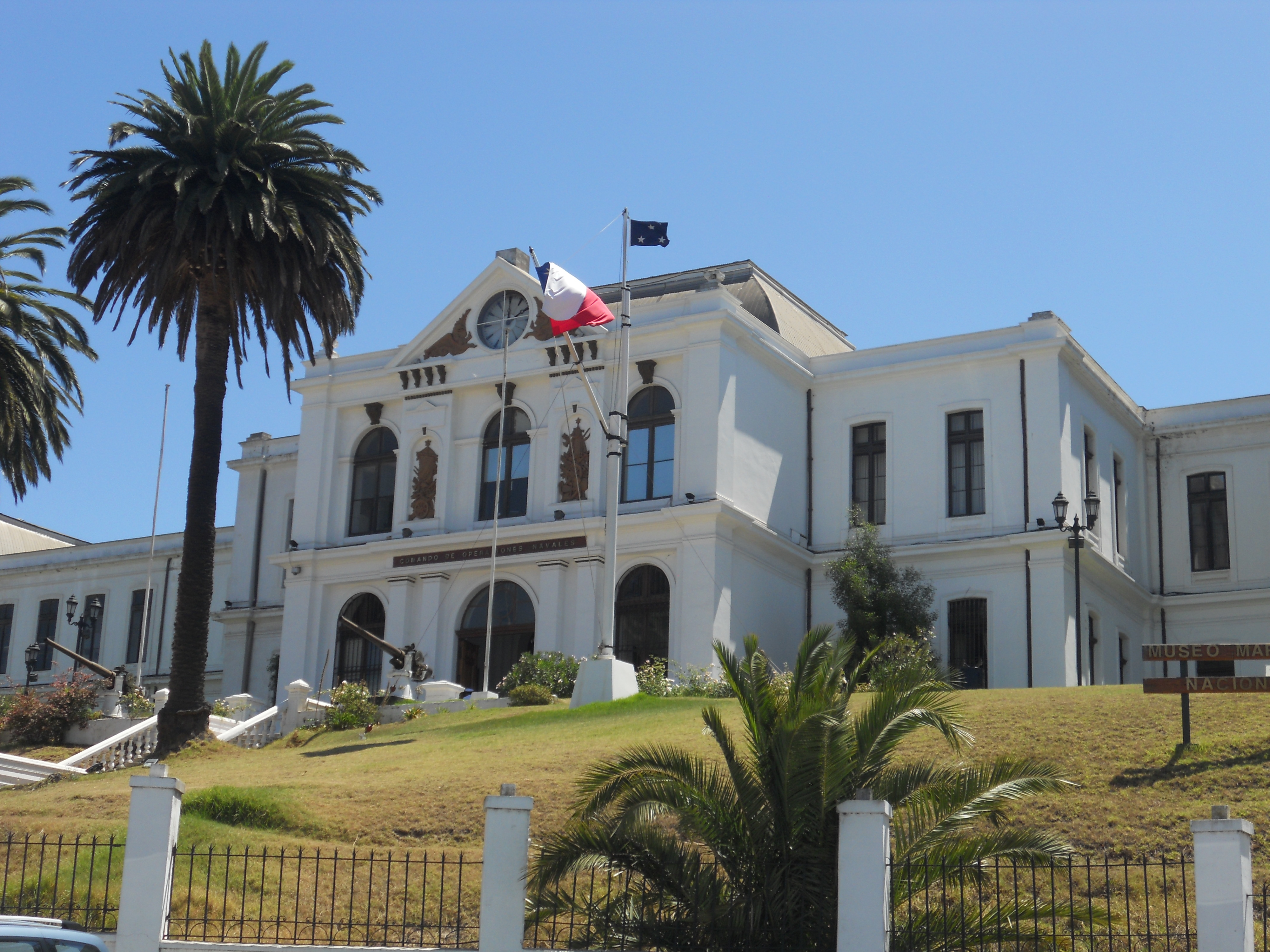 El edificio de la ex Escuela Naval, llamado oficialmente edificio Almirante Luis Uribe Orrego, que alberga el Comando de Operaciones Navales de la Armada (desde el 26 de diciembre de 2001) y, en su ala norte, el Museo Marítimo Nacional de Valparaíso (desde el 23 de mayo de 1988). This is a photo of a national monument in Chile: 2224